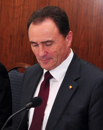 Podpis Memoranda o alpsko-karpatskom koridore (30.1.2012)